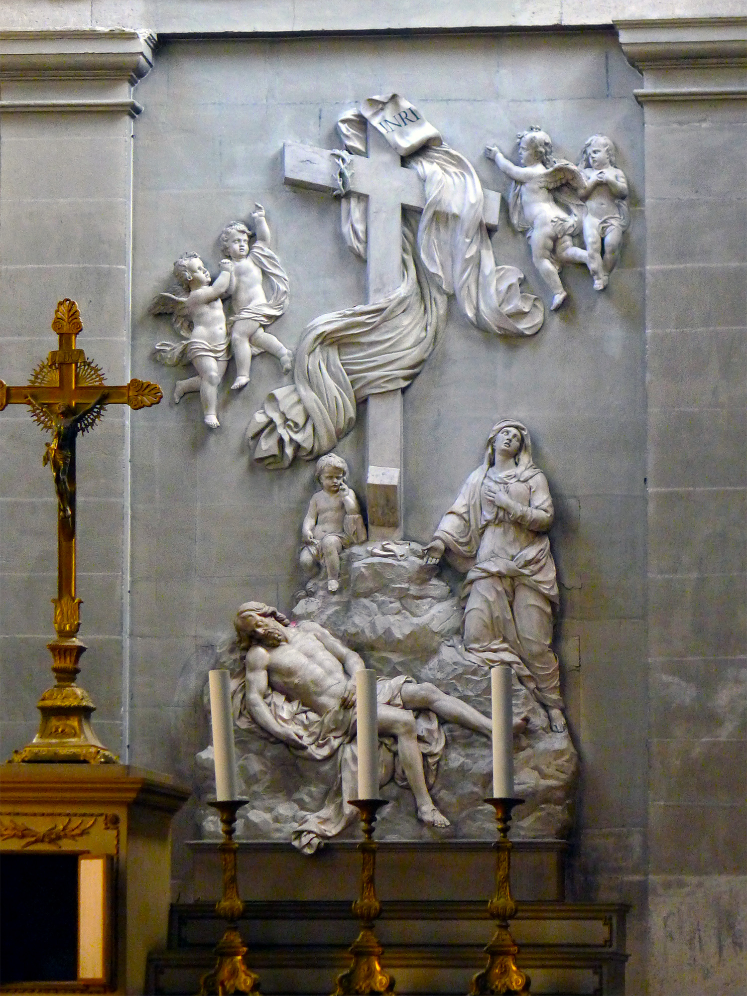 Église Sainte-Marguerite (bas-relief du choeur) - Paris XI